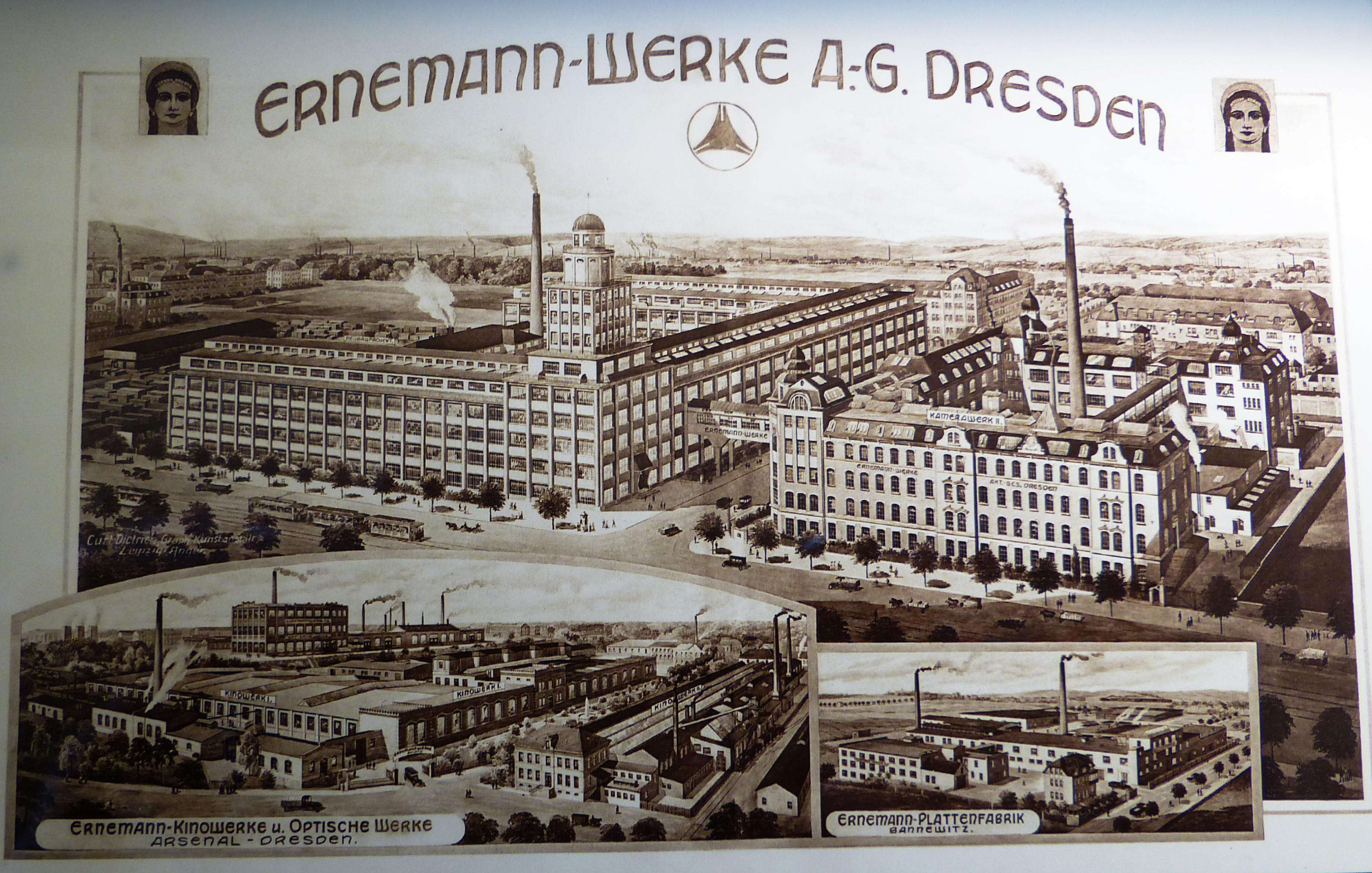 Postkarte der Ernemann Werke AG